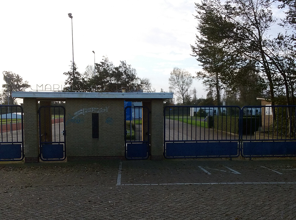 Hoofdingang Marine Sportpark aan de Ruyghweg, Den Helder.